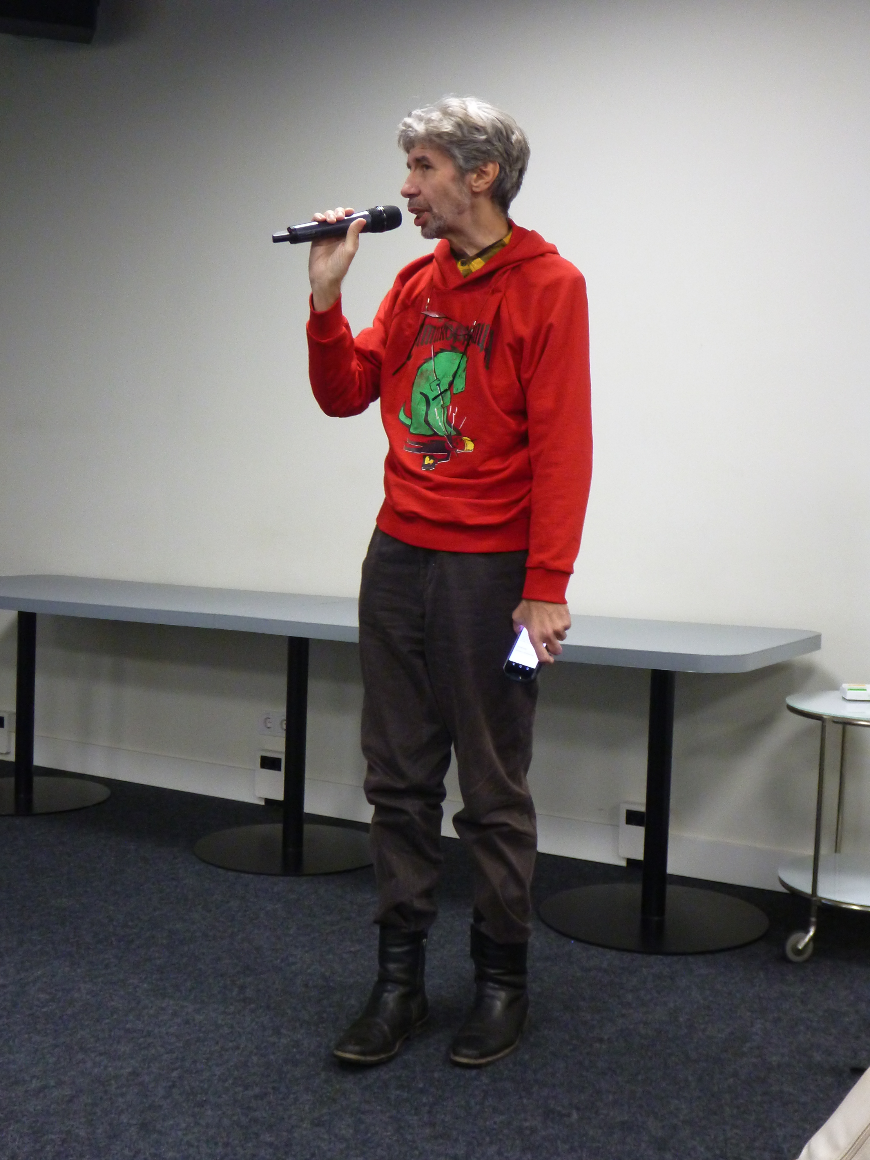 Журналист Кирилл одноклассник Дмитрия Якушкина в Ельцин-центре 21 января 2020 года